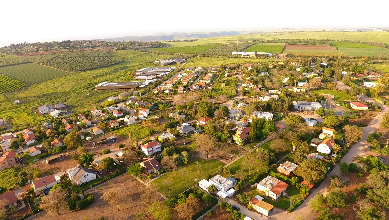 צילום